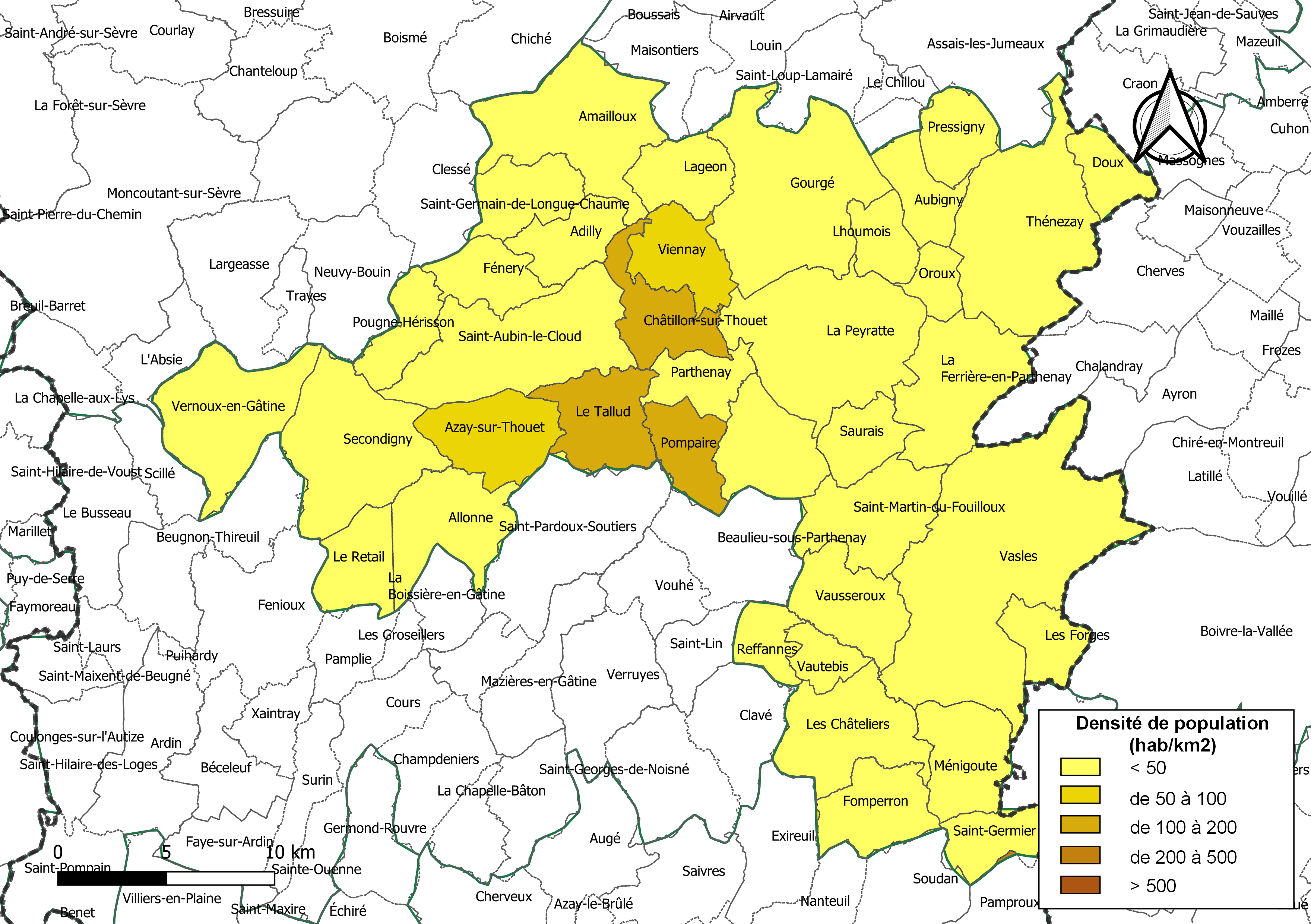 Carte des densités de population (millésimée 2016) des communes de la Communauté de communes de Parthenay-Gâtine, département des Deux-Sèvres, France. Composition au 1er janvier 2019.